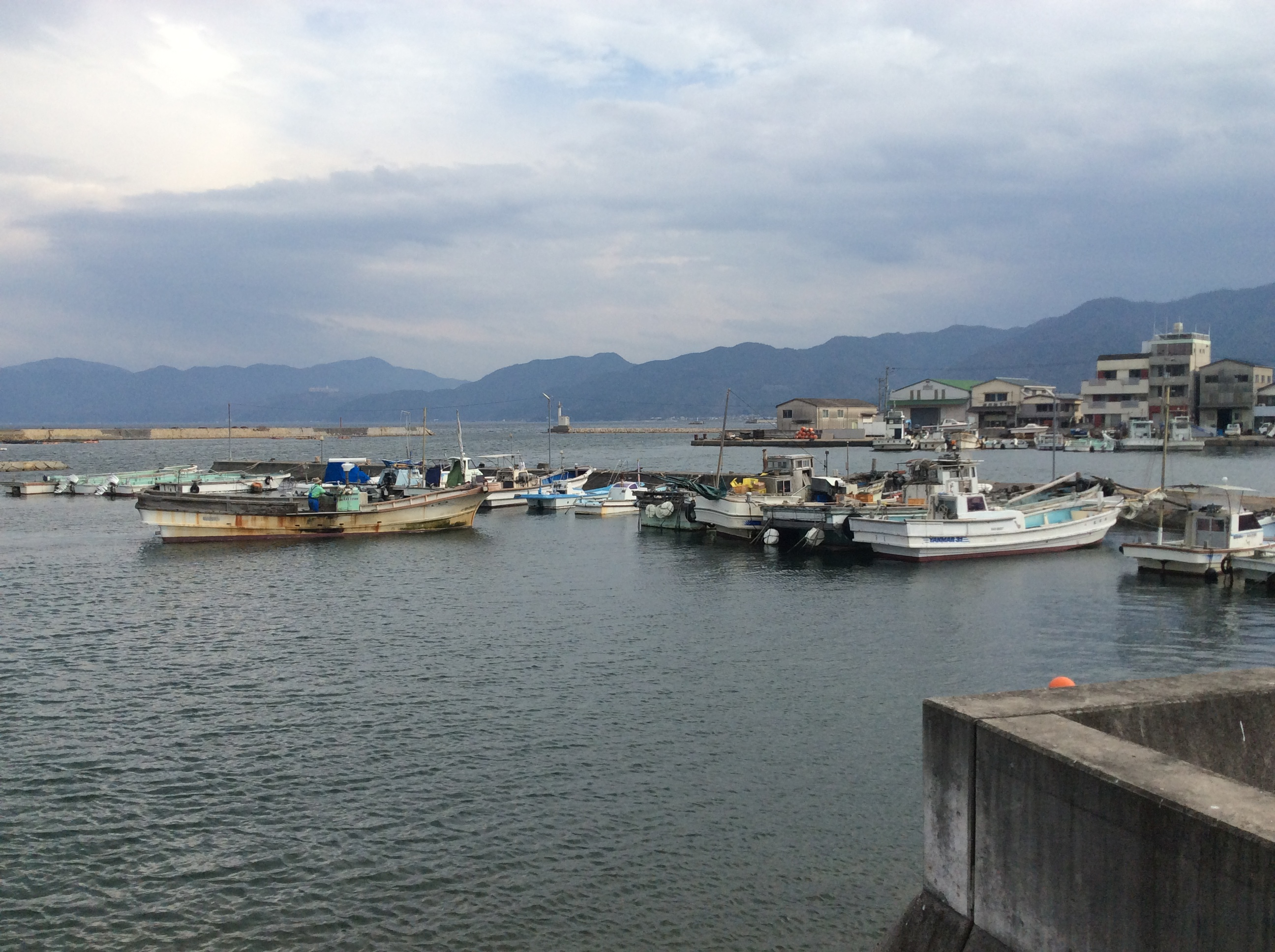 引田港（香川県東かがわ市）